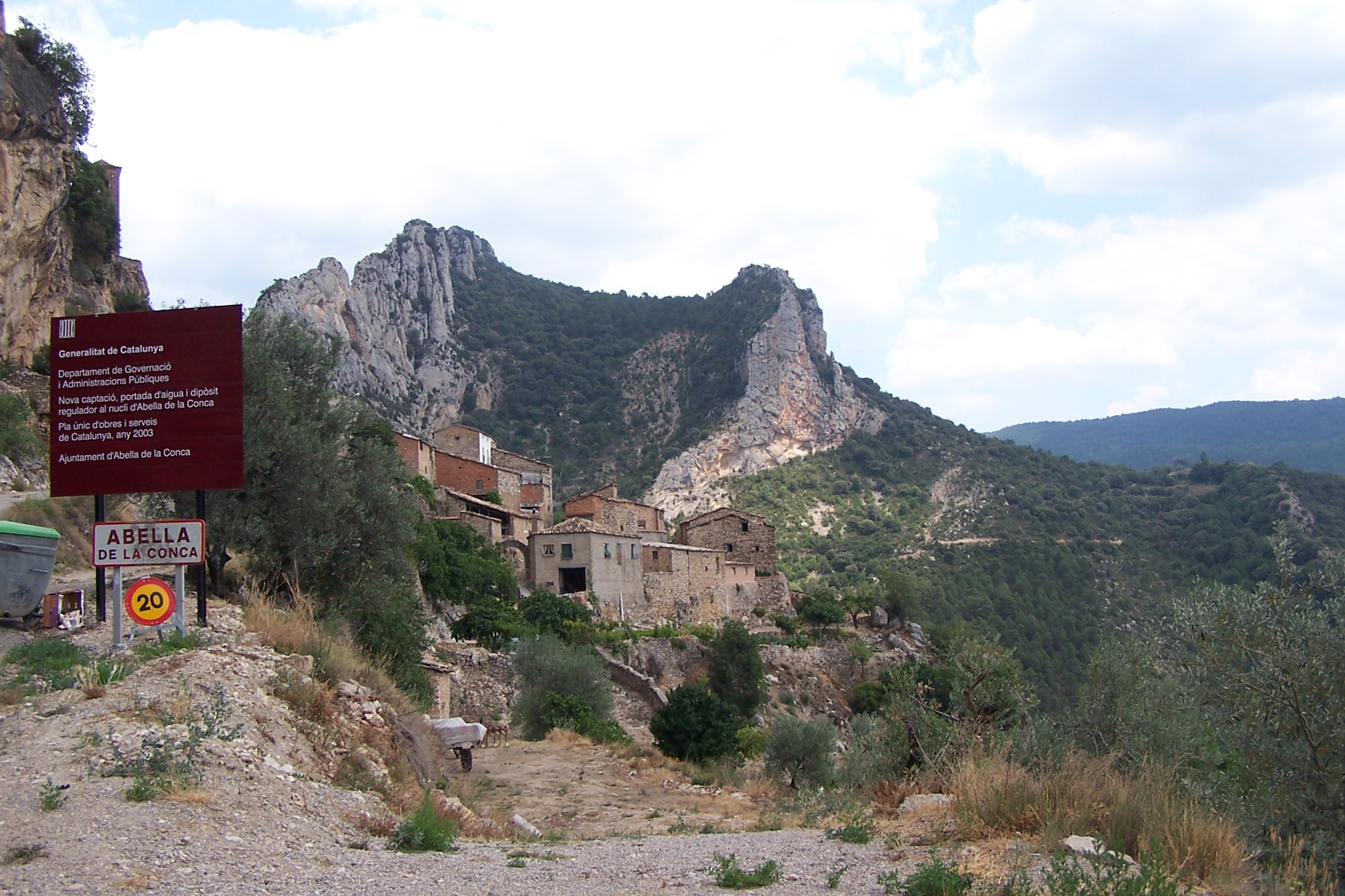 Eigen werk 2006-06-26